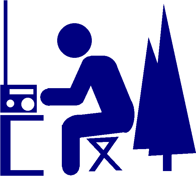 Логотип соревнований по многоборью радистов